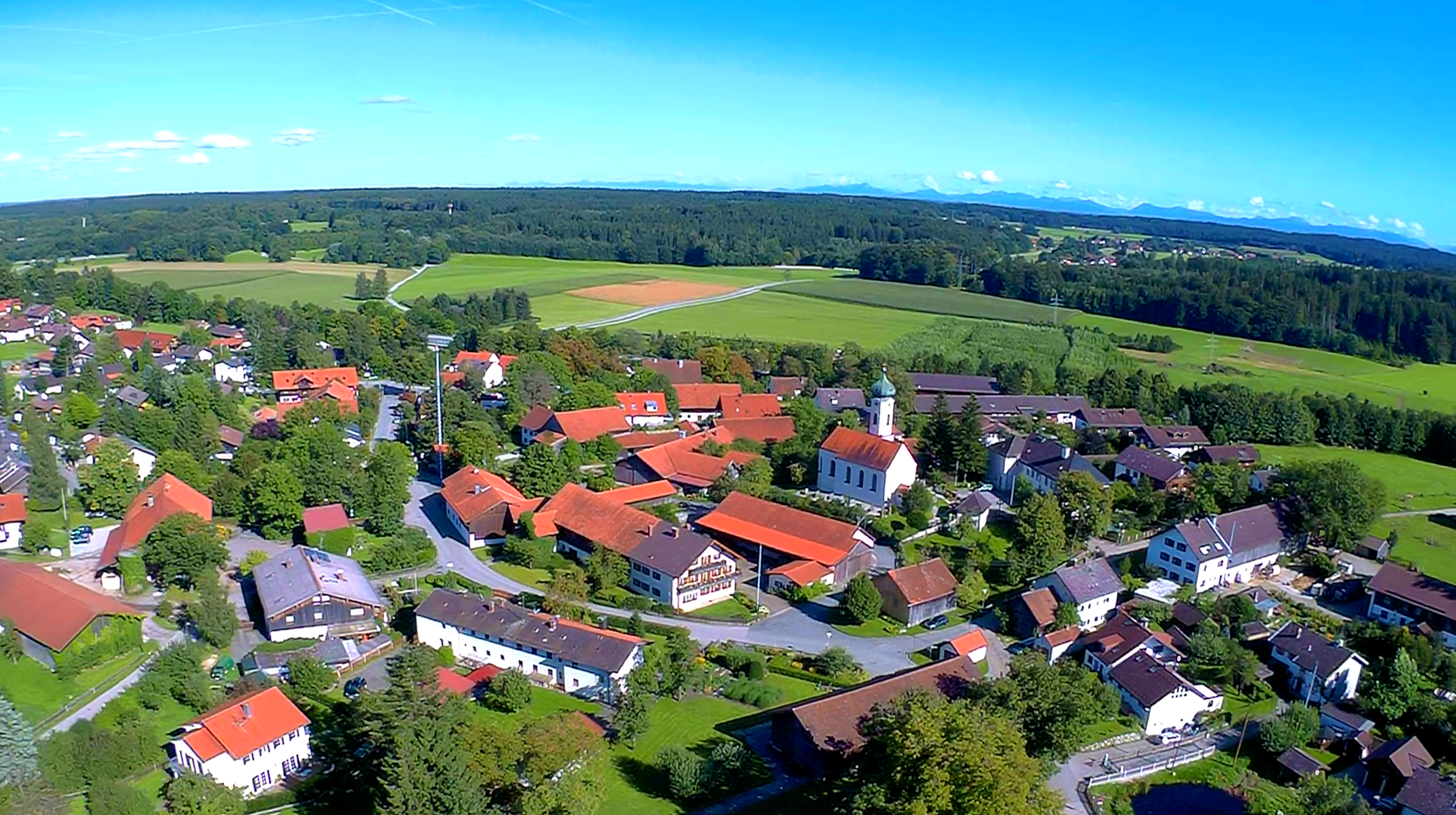 Wangen, Drohnen-Ortsnsicht von NNW